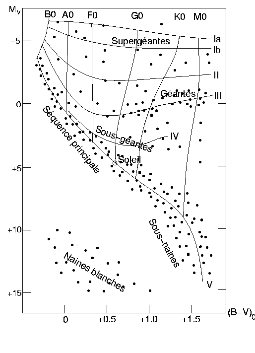 description figure pour Diagramme de Hertzsprung-Russell